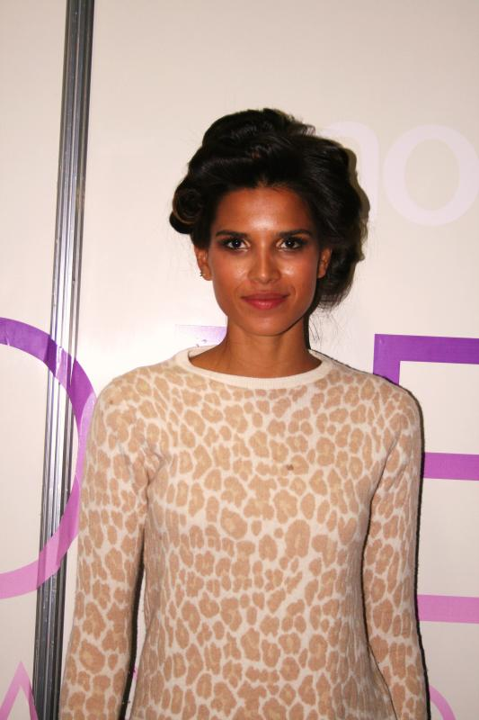 Raica Oliveira no Via Funchal em 2010.